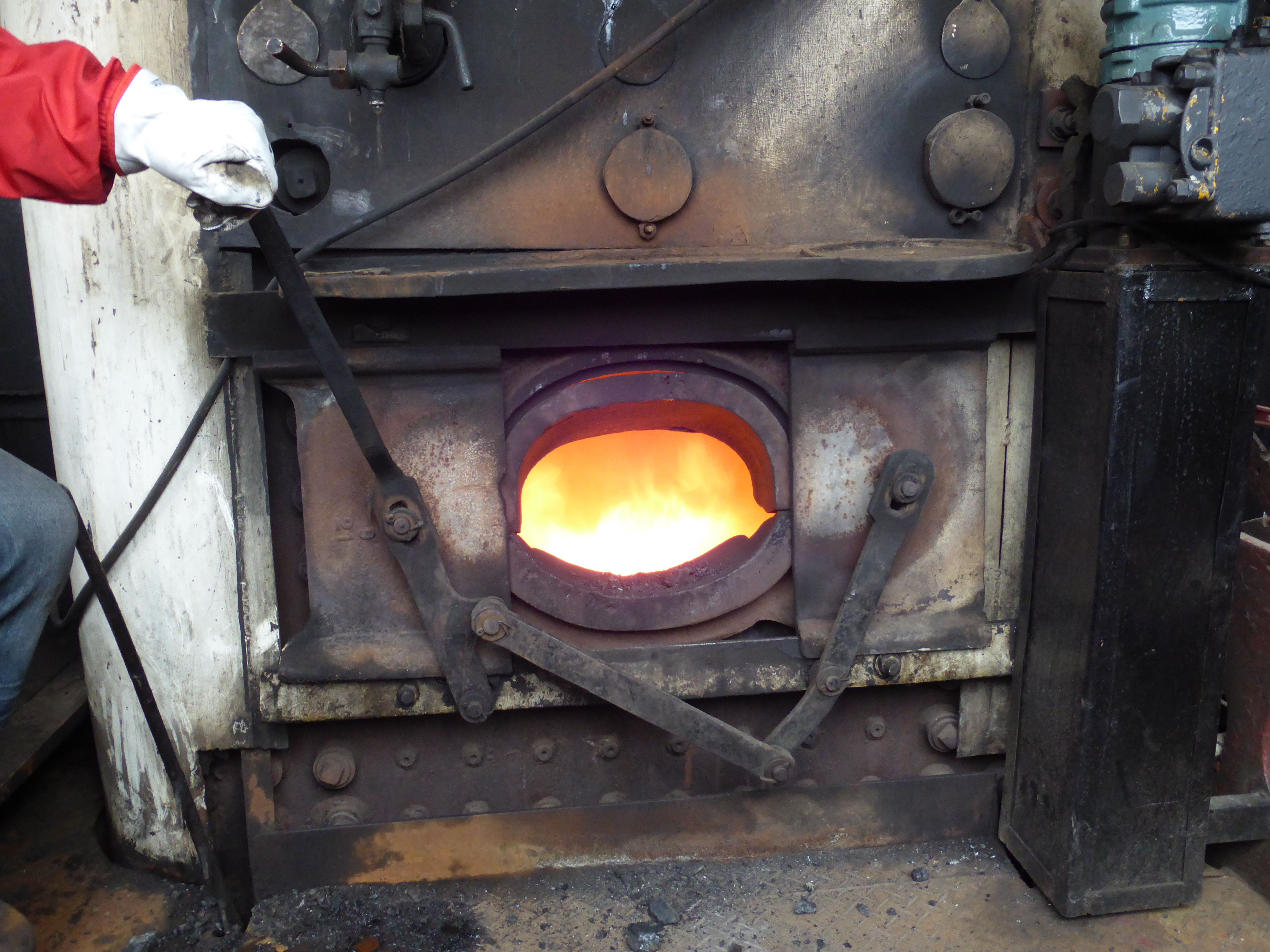 Locomotora de vapor 607, de Ferrocarriles del Estado, diseñada por "North British Locomotive Company". Construida parcialmente y montada en Chile, en Viña del Mar, por la "Sociedad de Maestranzas y Galvanización", de Caleta Abarca, en el año 1913. Esta locomotora, de vía o trocha ancha, fue clasificada como "Tipo 57". En la fotografía vemos abierta la puerta del hogar. Su rodaje es tipo 130 (2-6-0). Estación Central de Santiago de Chile, durante el "Día del Patrimonio Cultural".